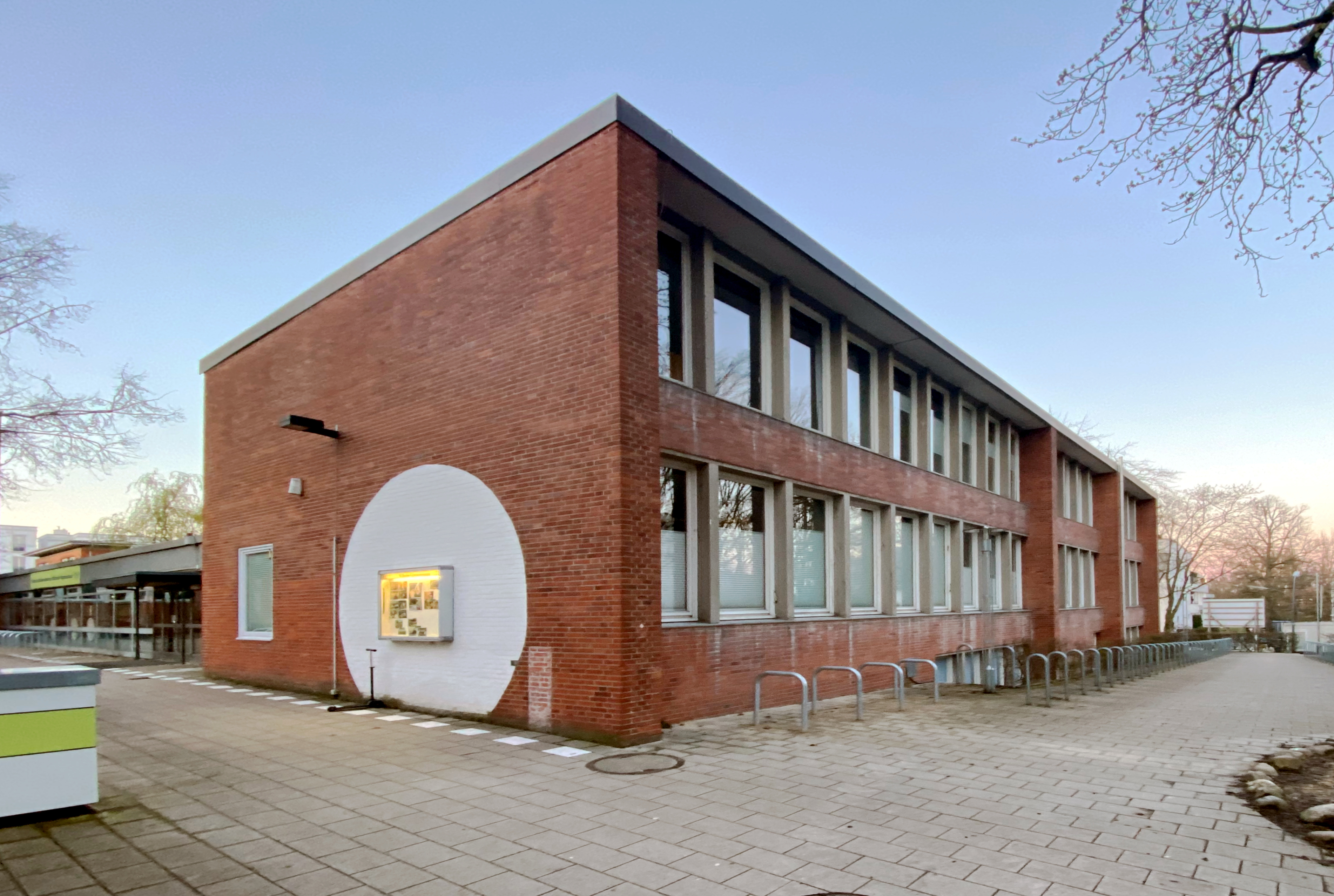 Wilhelm-Gymnasium in Hamburg-Harvestehude, Verwaltungstrakt mit Lehrerzimmer und Schulbibliothek.